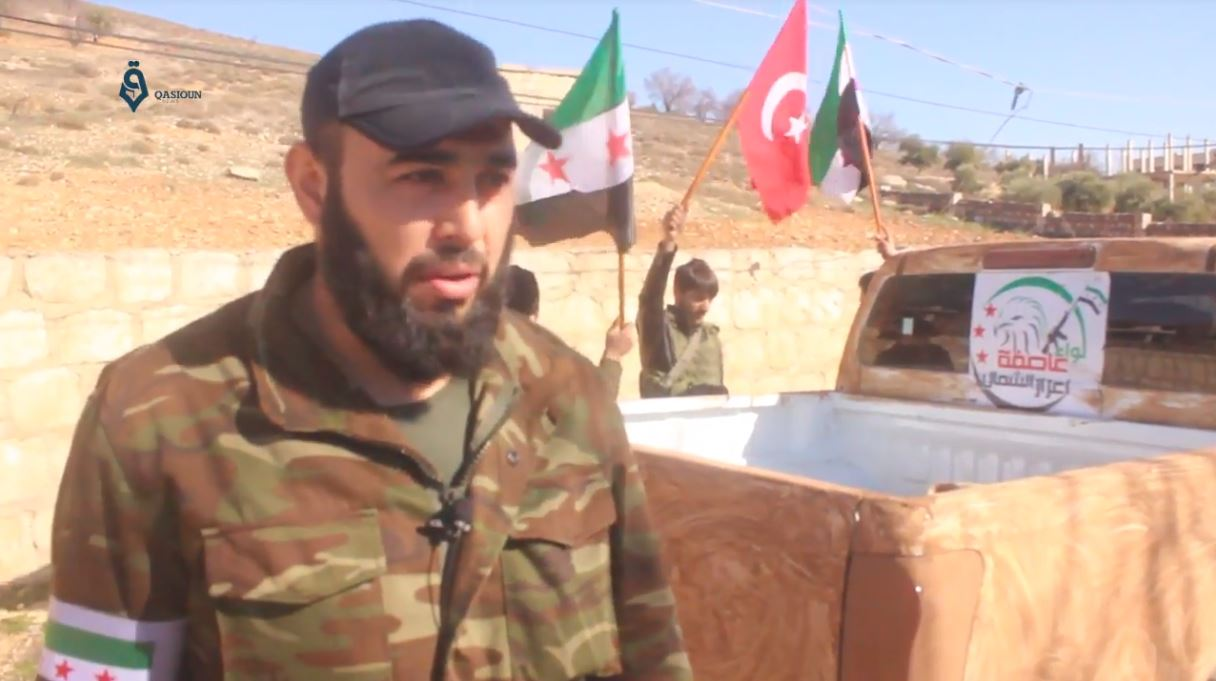 Des rebelles syriens de la Brigade de la Tempête du Nord dans le village de Qastal Jando, près d'Afrine, le 1er février 2018.